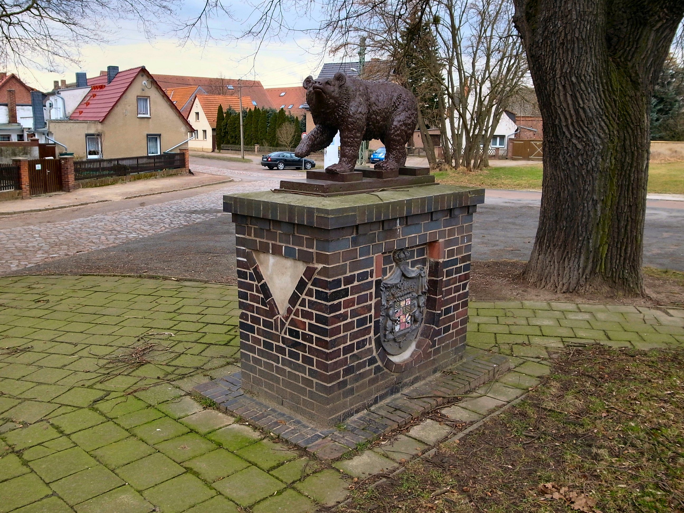 Dessau-Mildensee,Bärendenkmal